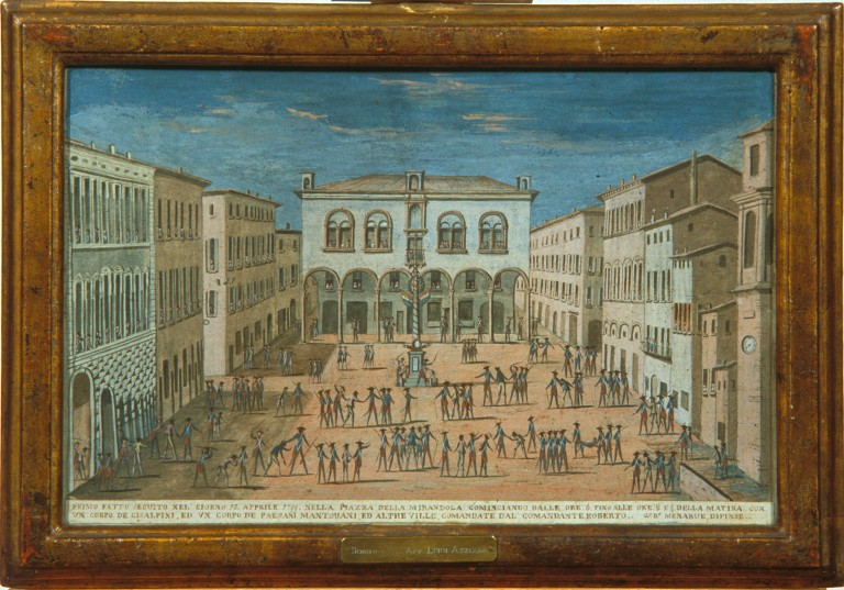 Primo fatto seguito nel giorno 15 aprile 1799 nella piazza della Mirandola, cominciando dalle ore 6 fino alle ore 8 e 1/2 della matina, con un corpo de cisalpini, ed un corpo de paesani mantovani, ed altre ville, comandate dal comandante Roberto... G.° B.° Menabue dipinse.